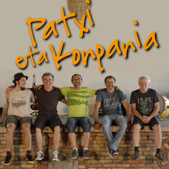 Patxi eta konpainia mudika talde dantza-animatzailea.